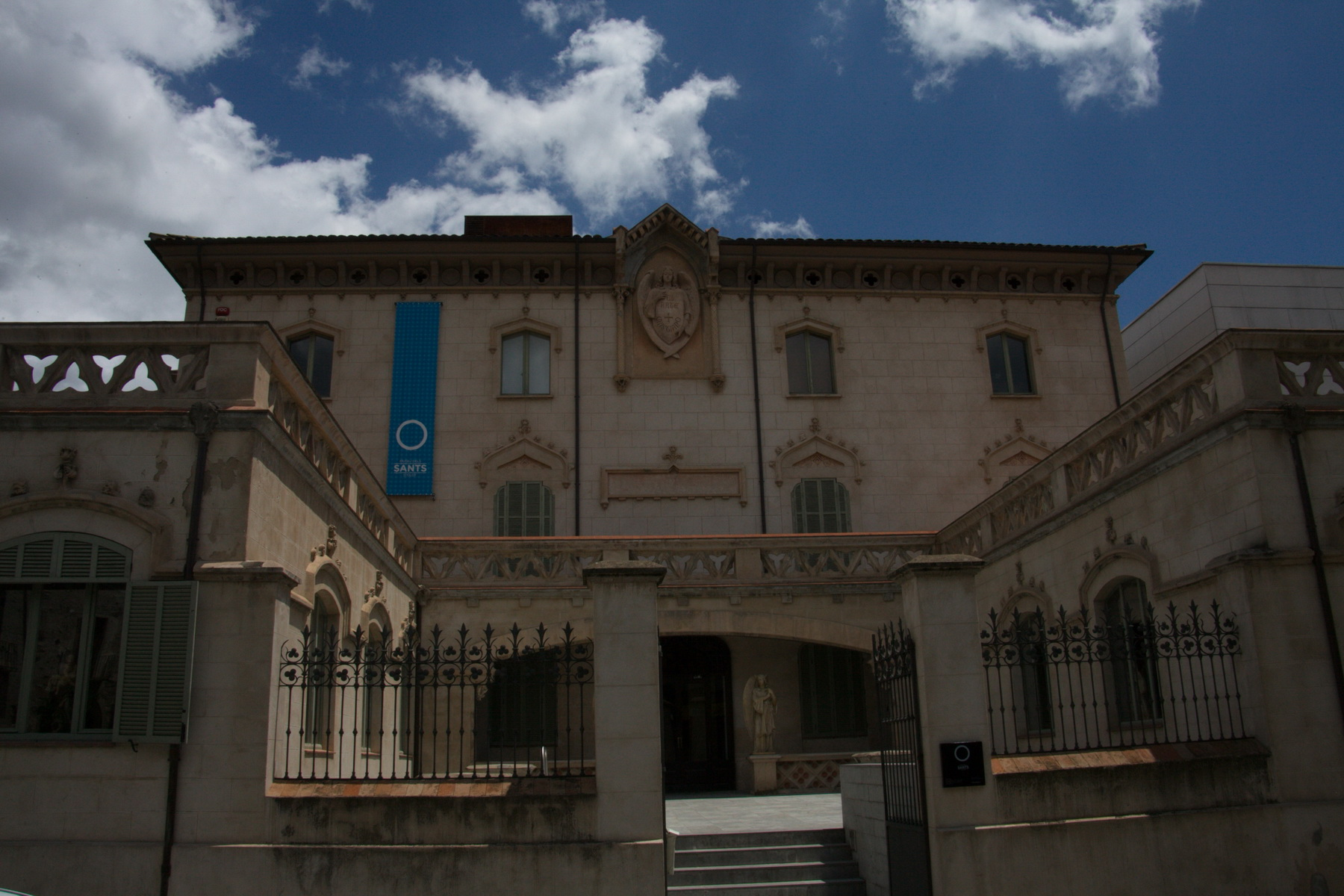 Edifici de l'Art Cristià (Olot)